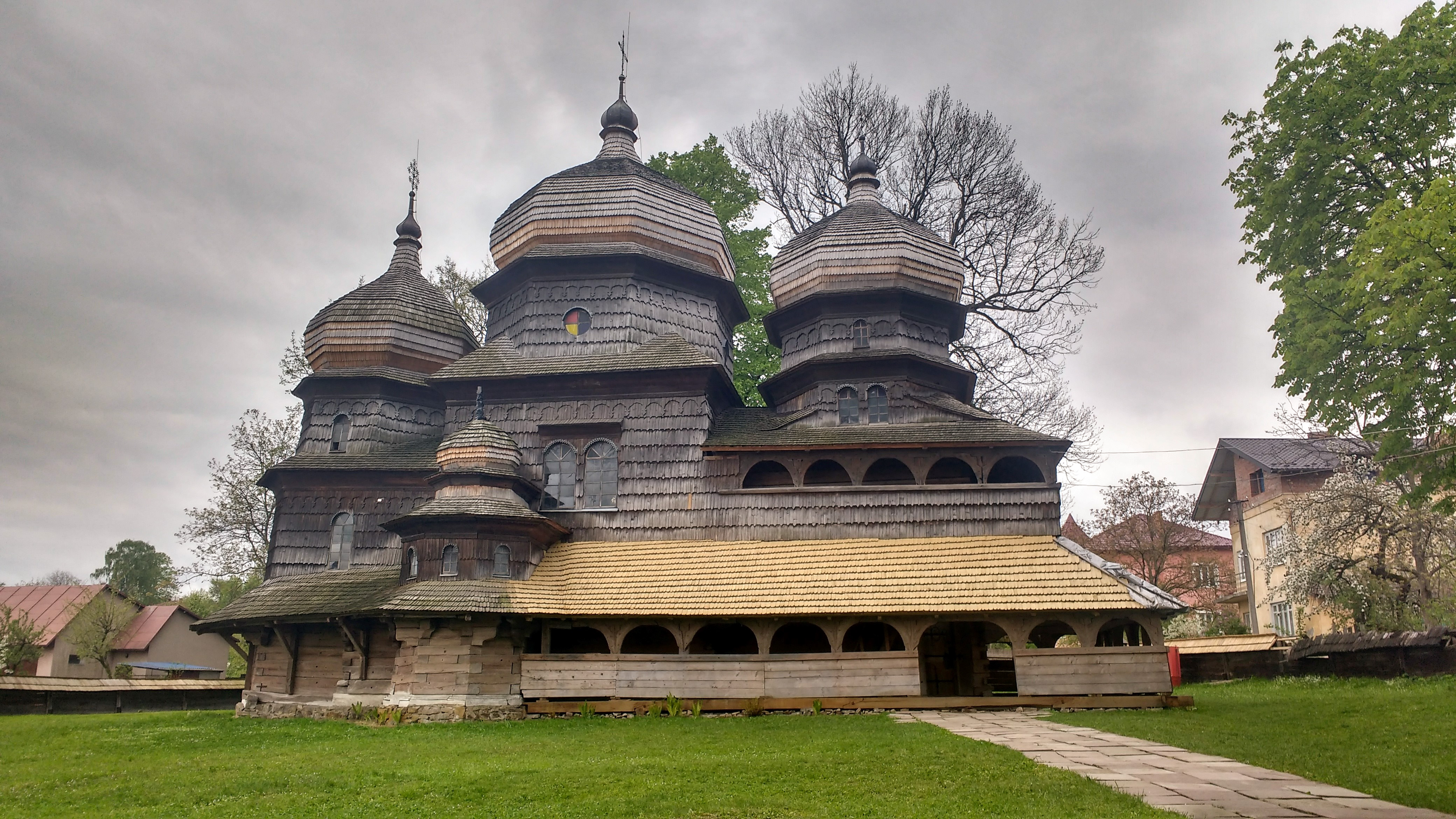 Церква Святого Юрія, Дрогобич, вул. Солоний Ставок, 23